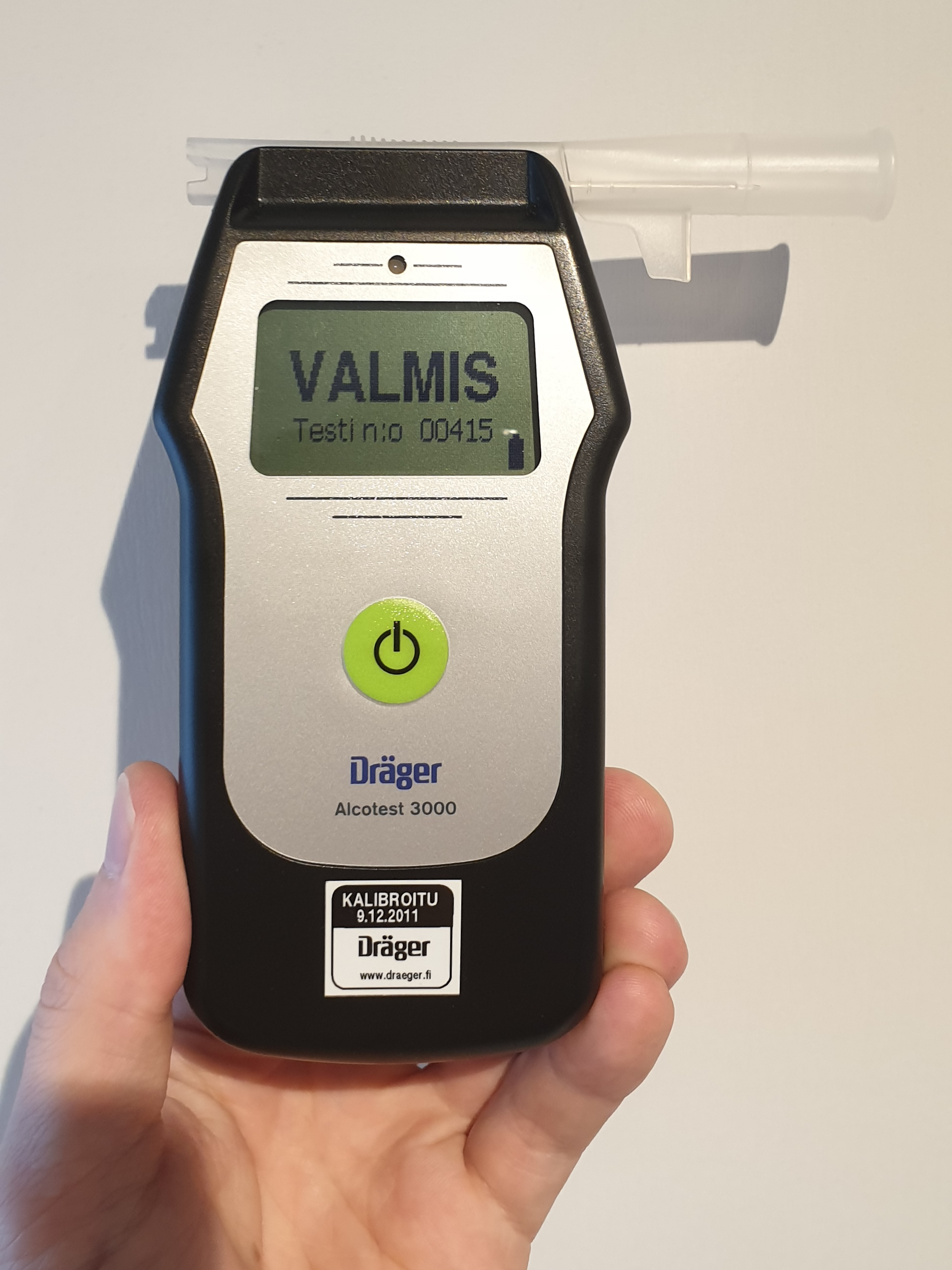 Kuva omistamastani viranomaisalkometristä